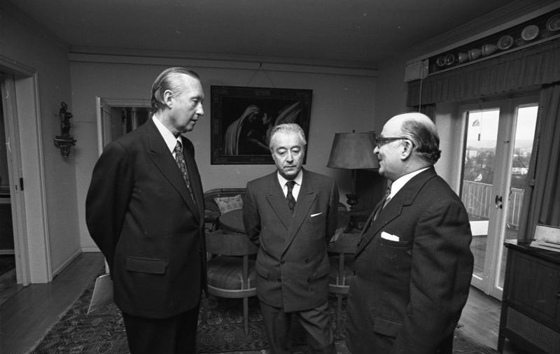 Sitzung der deutsch-französischen Kulturstiftung im Konrad Adenauer Haus in Rhöndorf. (links: Dr. Adenauer)